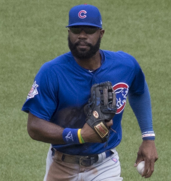 Cubs at Orioles 7/16/17